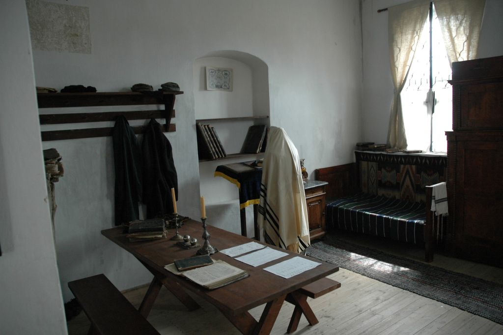 Melamed room - staging in museum in Wlodawa, Poland